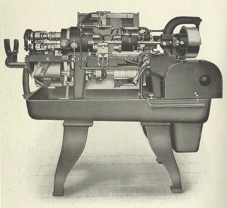 Mehrspindlige Revolver Drehbank - Modell VSI